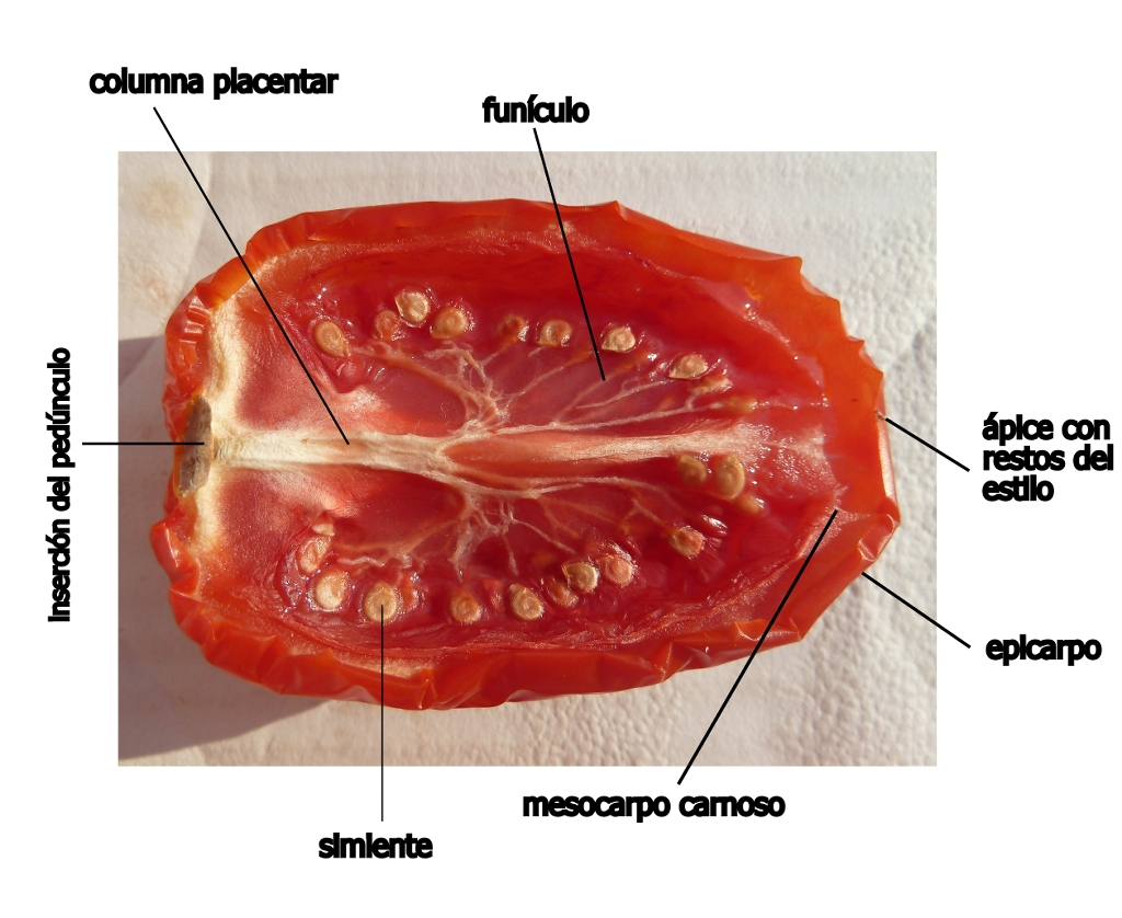 Solanum lycopersicum cv. pera : Corte longitudinal de un tomate y su morfología interna - Comercio, Águilas, Murcia (España).